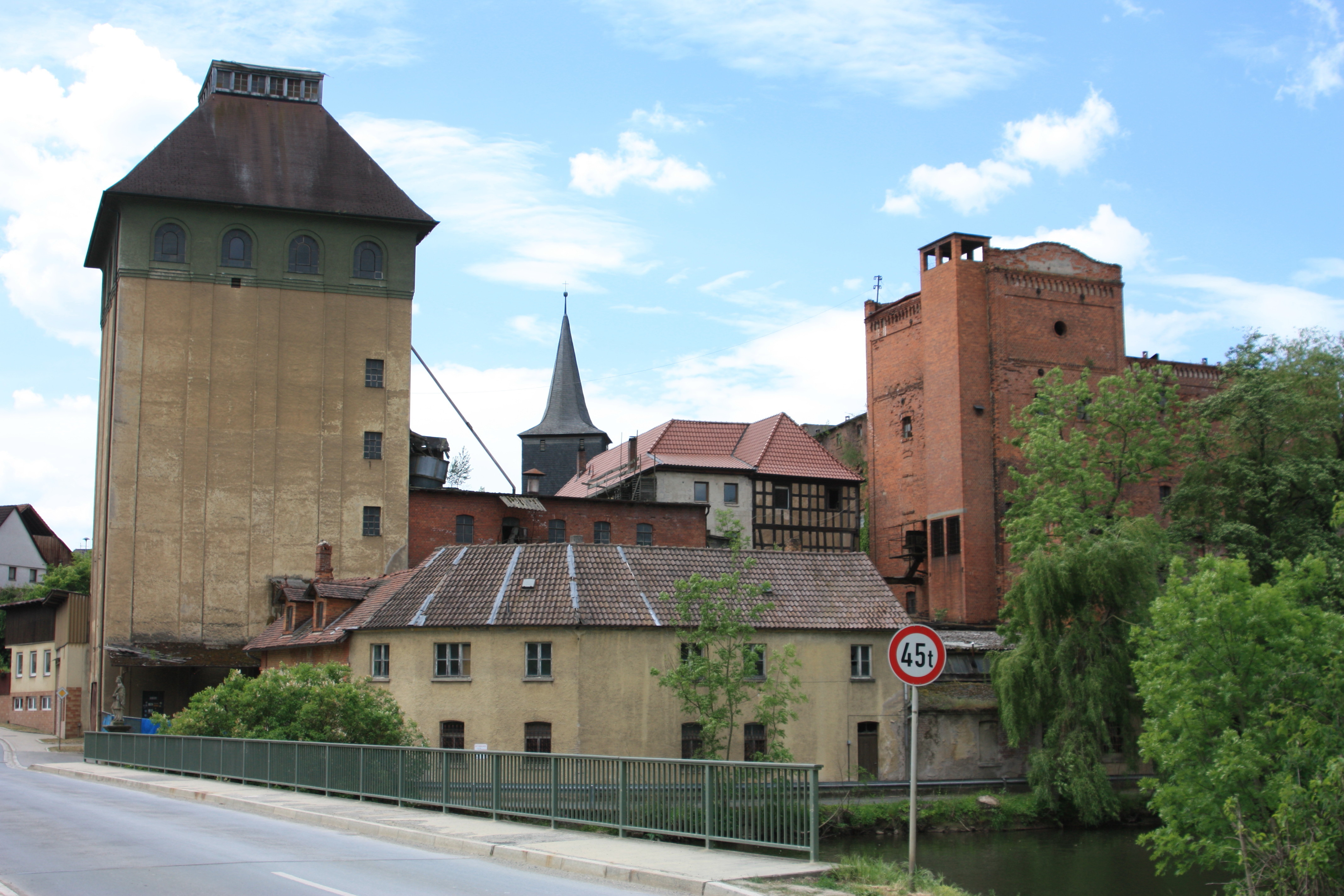 Altenkunstadt OT Maineck